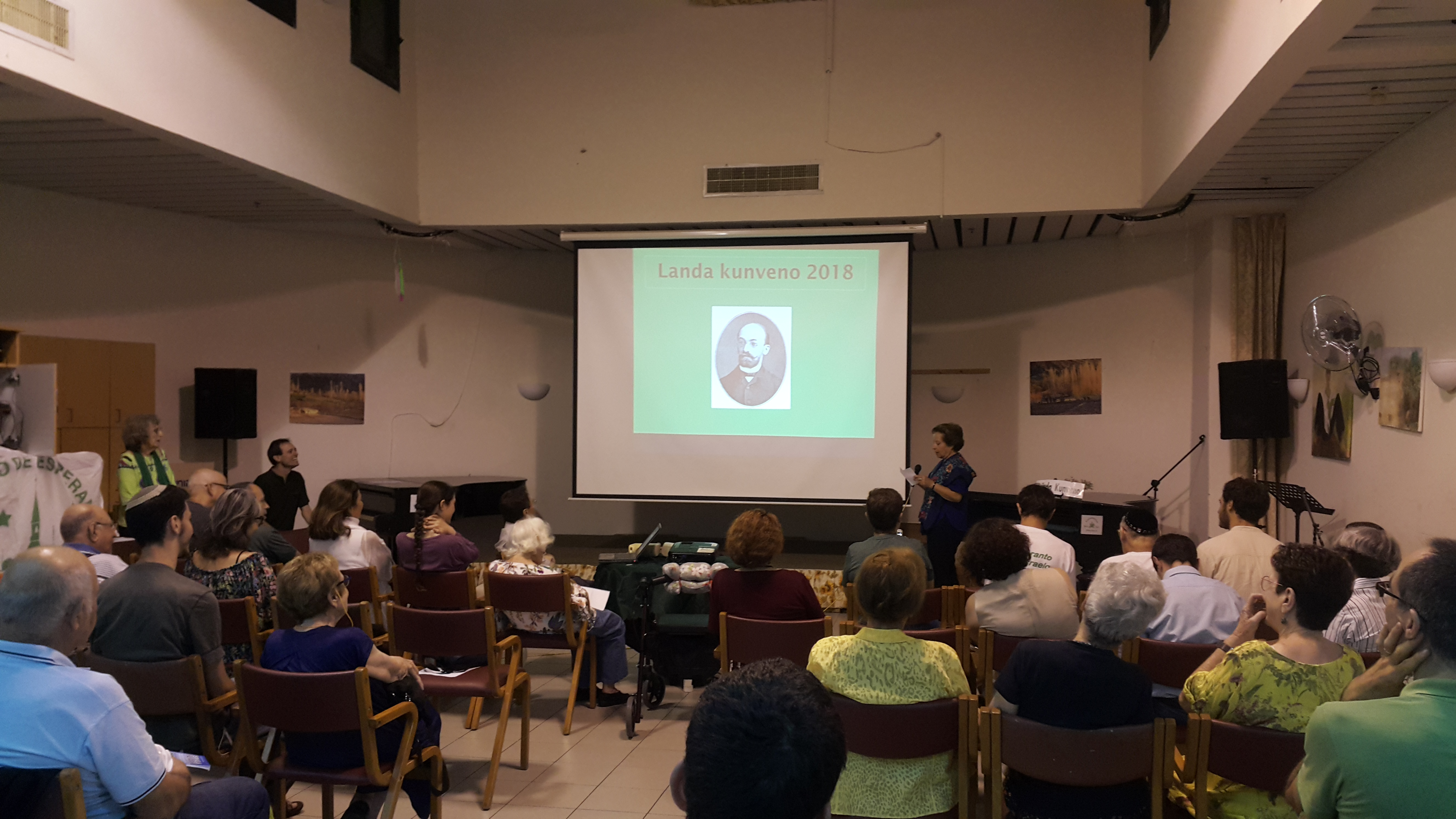 E-o landa kuveno en Israelo - Somero 2018